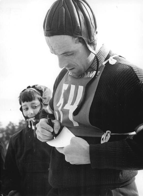 Zentralbild Gahlbeck 25.3.1962 Sprunglauf in Oberwiesenthal Am 25.3.1962 wurde in Oberwiesenthal der Pokal-Sprunglauf der "Volksstimme" Karl-Marx-Stadt ausgetragen. Mit Springern aus 7 Ländern war dieser Spezialsprunglauf auf der Fichtelberg-Schanze hervorragned besetzt. UBz: Der sympathische Sportler Willy Egger (Österreich) erfüllt an der Fichtelberg-Schanze bereitwillig Autogrammwünsche.